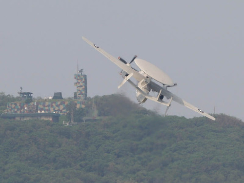 中華民國空軍E-2K早期預警機從臺東空軍志航基地起飛。